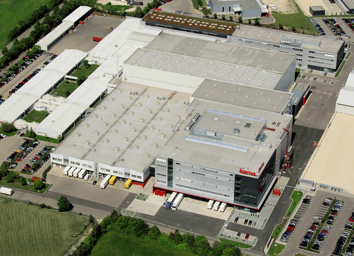 Hama Luftbild 2014